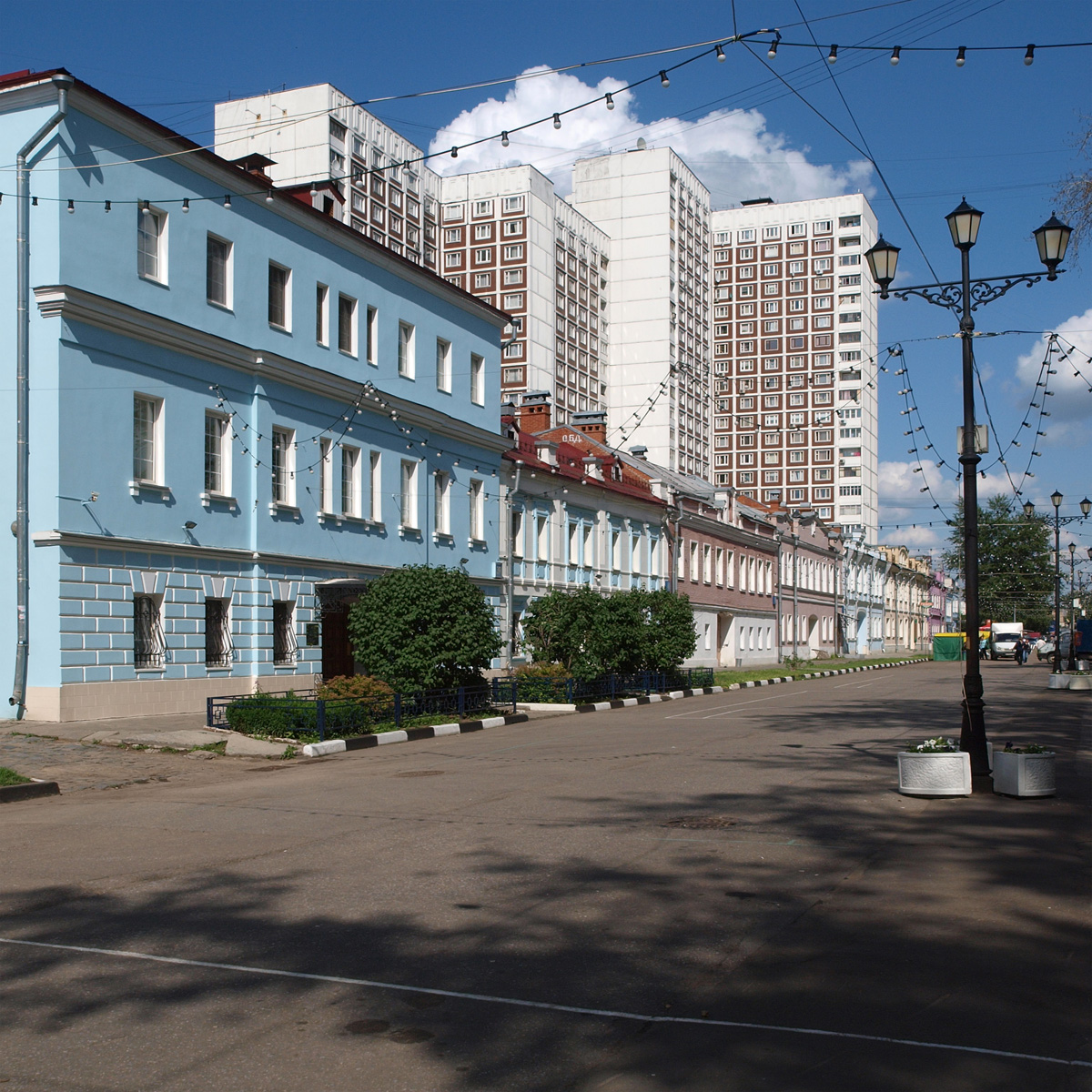 Shkolnaya Street, Moscow